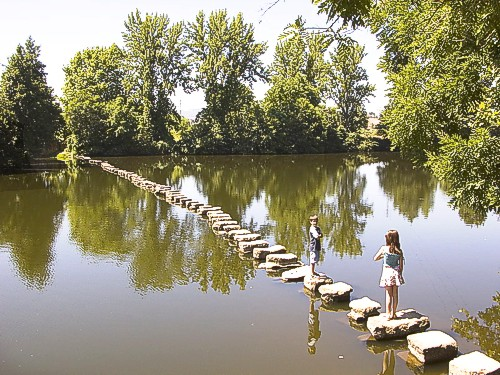 Poldras de Chaves sobre o rio Tâmega - Portugal